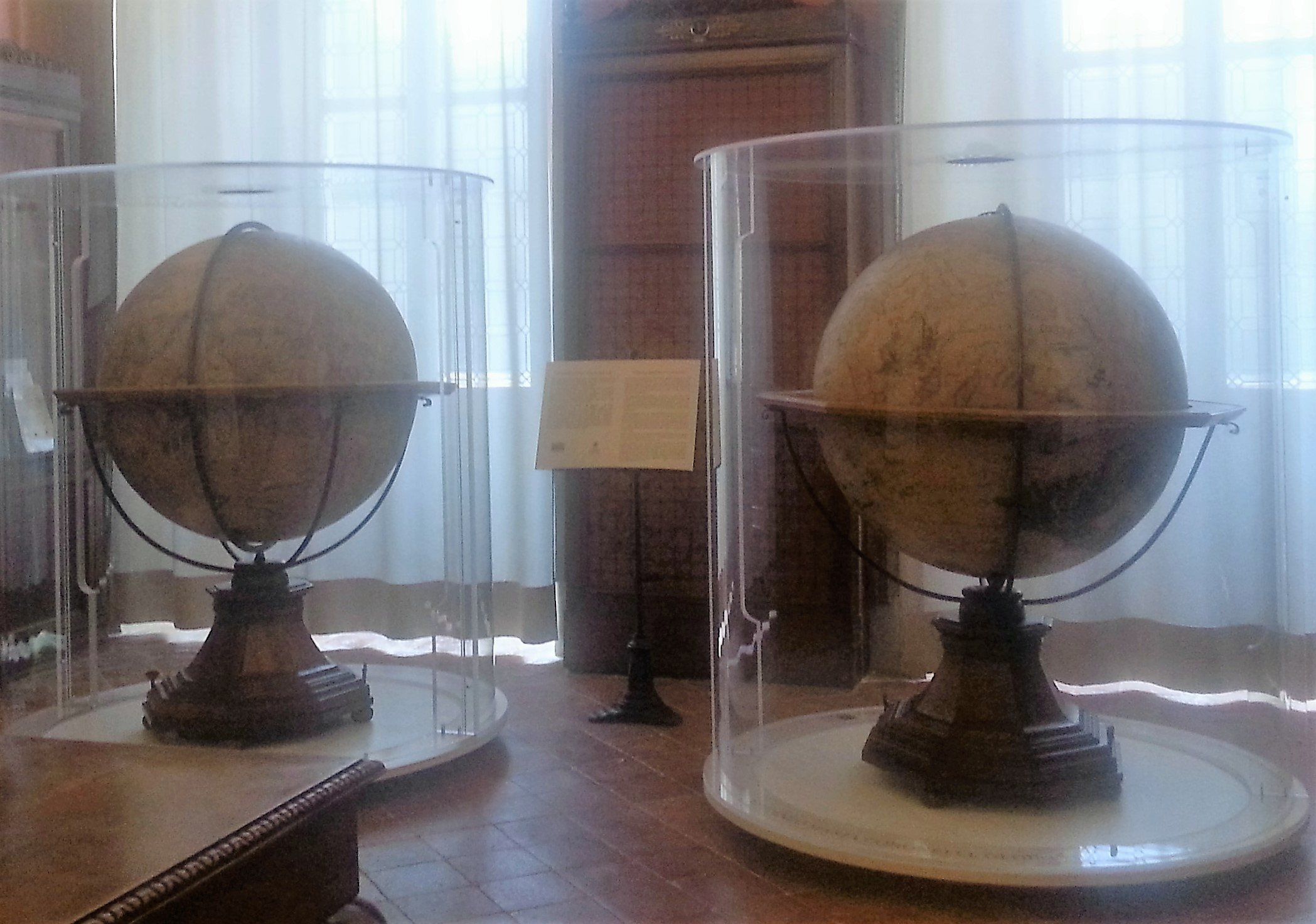 Globi della sala Tassiniana - Biblioteca Civica Angelo Mai -Palazzo Nuovo